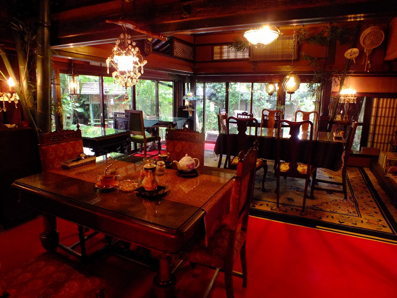 Edoshinden Company（丹波篠山江戸親伝）篠山市乾新町